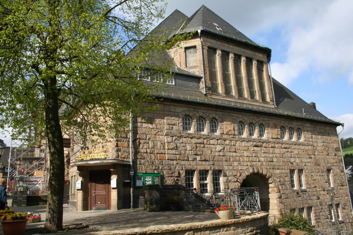 Dieses Haus ist denkmalgeschützt.Adresse: Hauptstr. 64 in 42555 Velbert-Langenberg